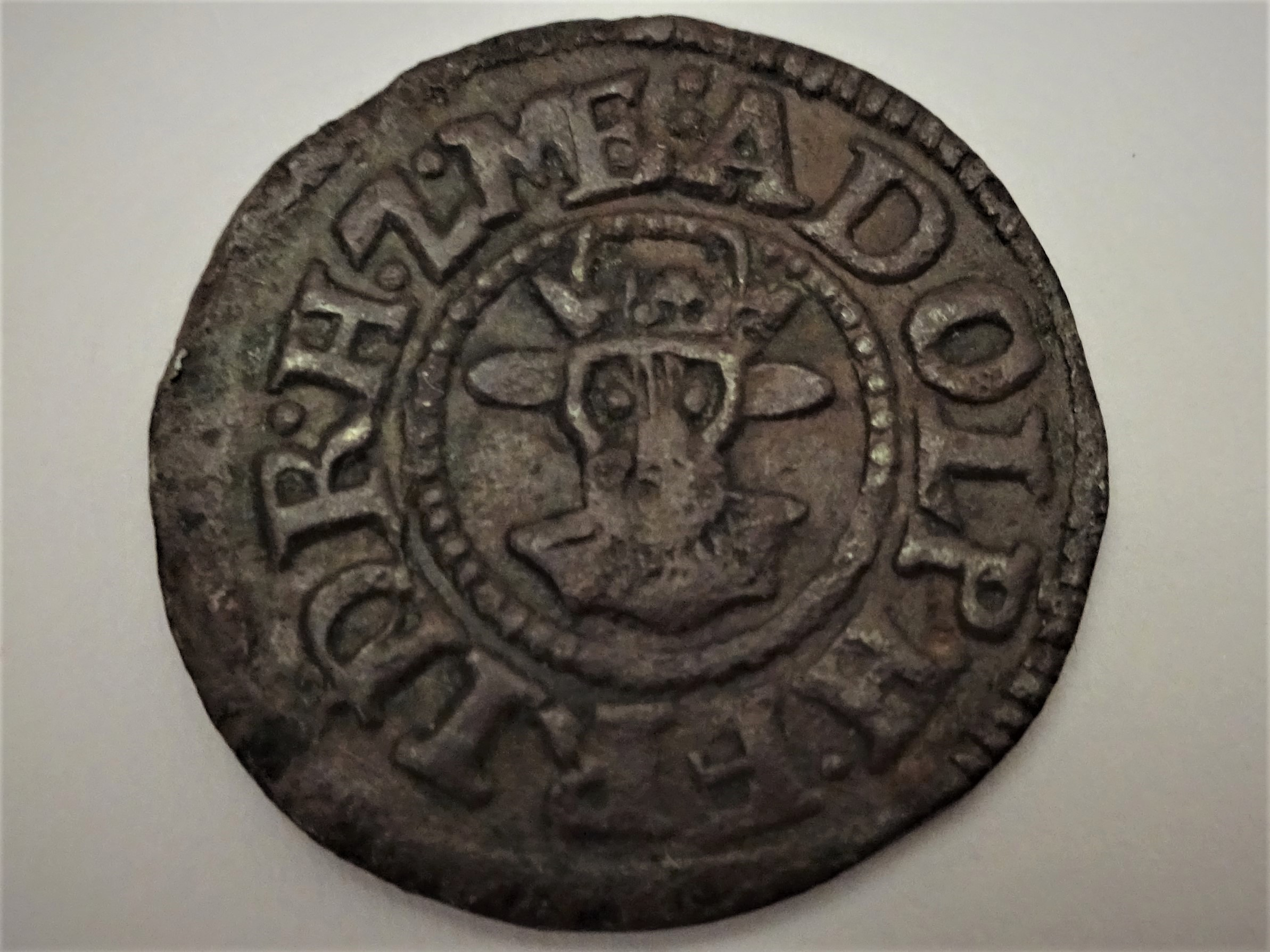 3 Pfennigmünze z.Zt. Adolf Friedrich I. von Mecklenburg (1622), Kunzel 215